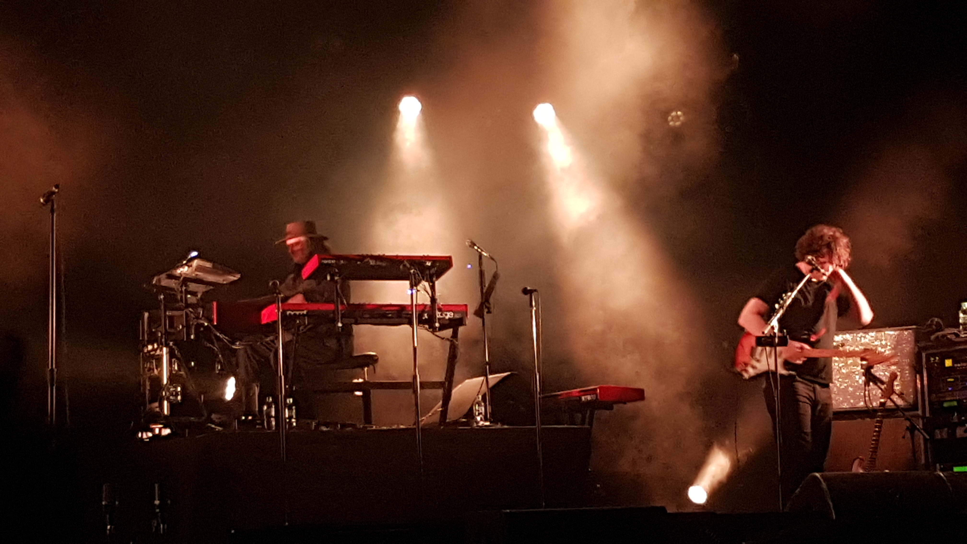 The Australian Pink Floyd Show à la Seine musicale, le 14 avril 2019, All That You Love tour.